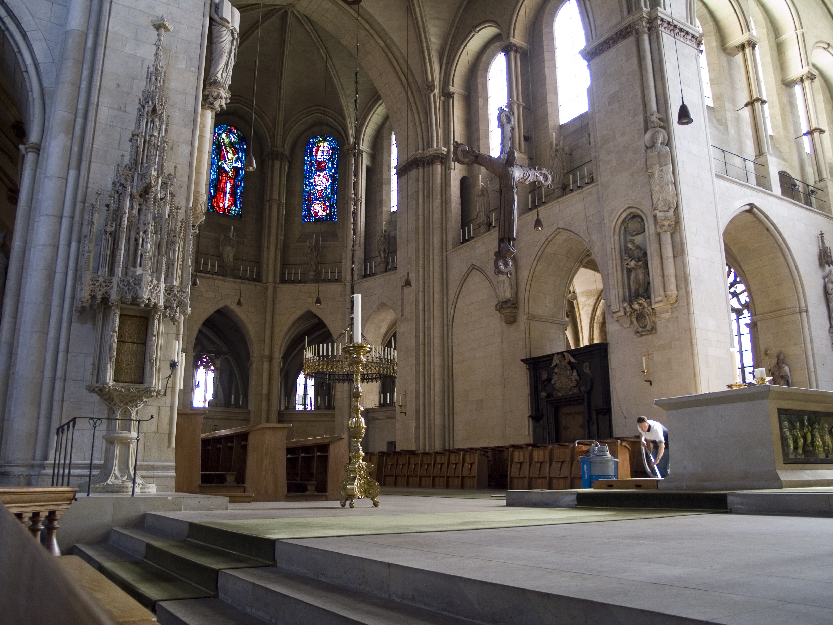 Северный Рейн - Вестфалия, Мюнстер - собор Святого Павла